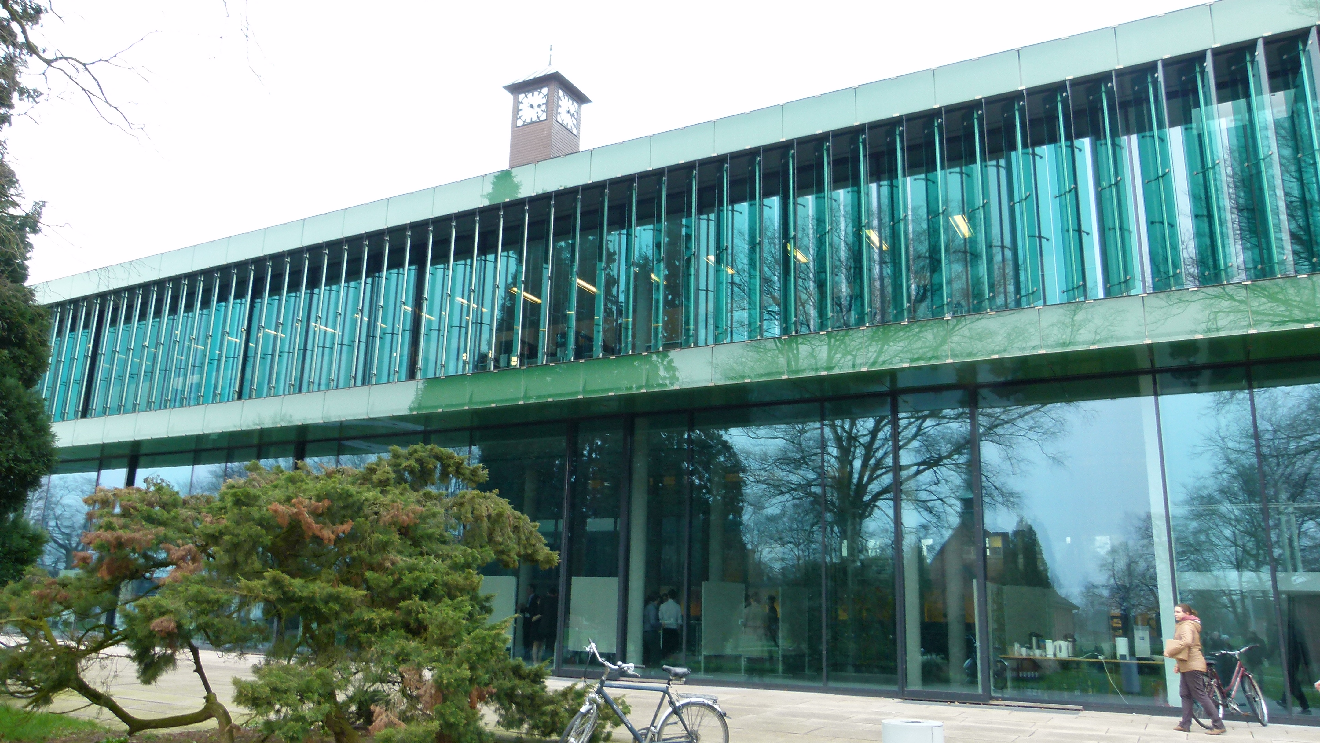 Jacobs University in Bremen-Grohn (Vegesack)